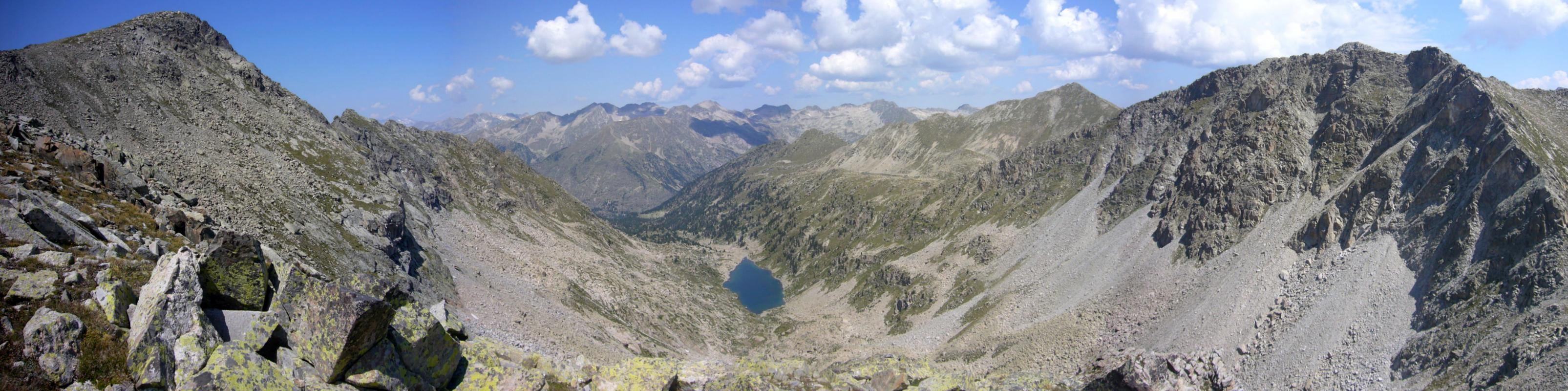 Vall de Morrano vista des de la Collada de Morrano; la Vall de Boí, Alta Ribagorça, Catalunya